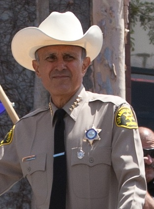 Lee Baca